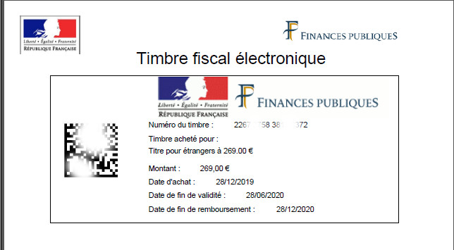 Reproduction retouchée d'un timbre fiscal informatisé, émis par le site de la Direction générale des finances publiques